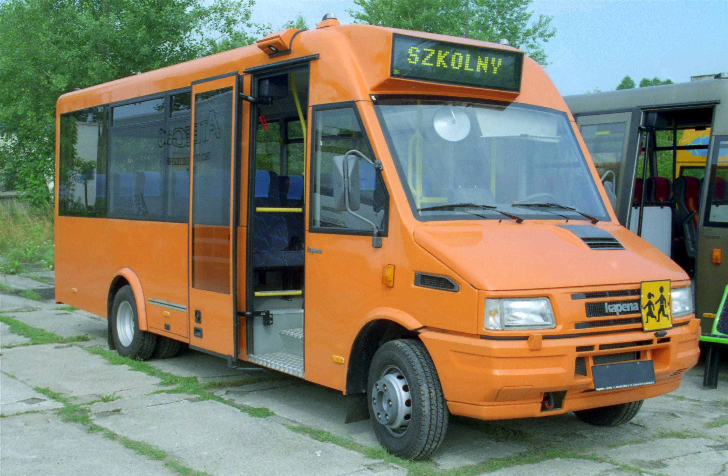 Polski autobus szkolny marki Kapena na bazie Iveco Daily drugiej generacji.